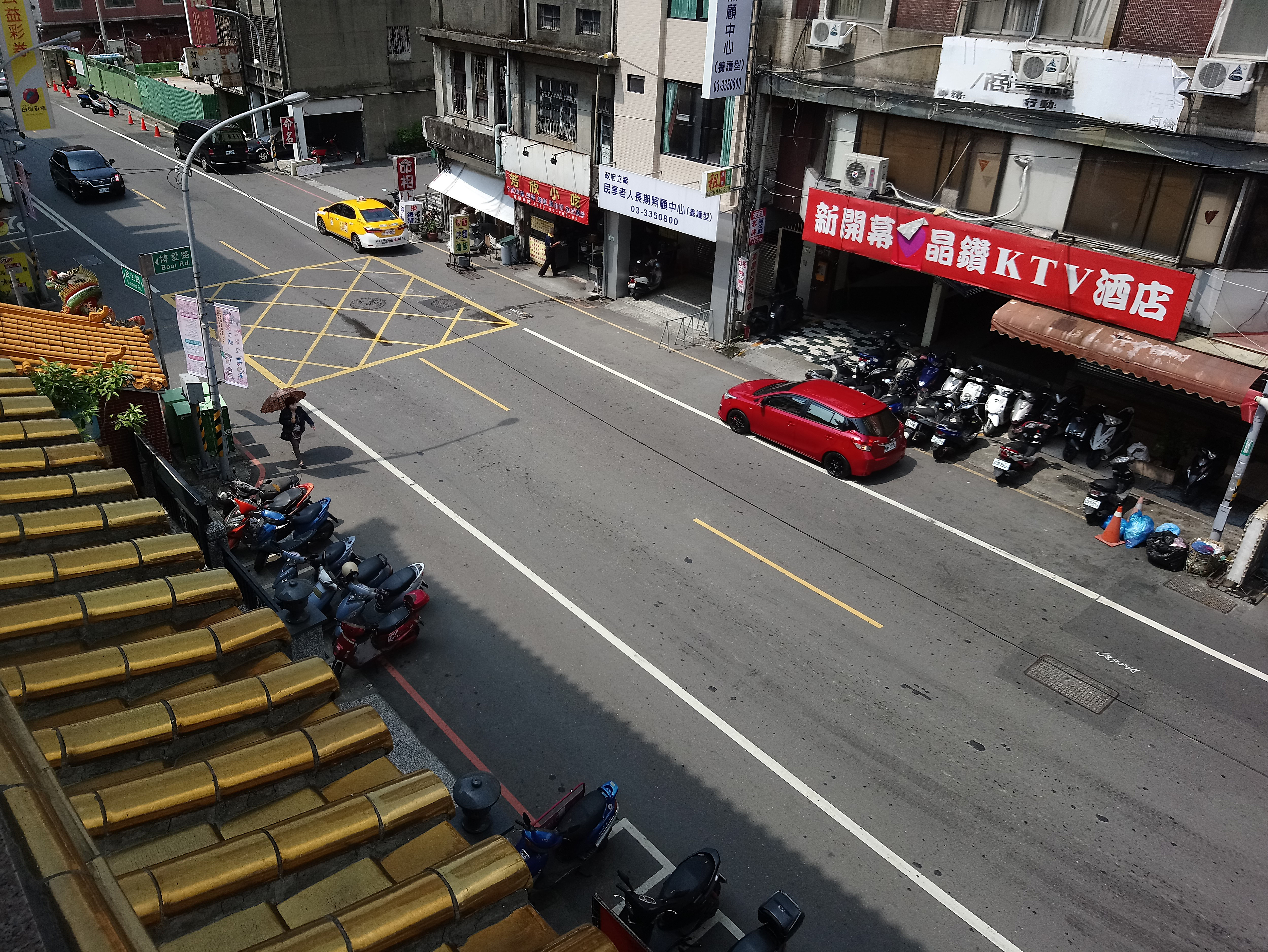 由鴻福寺看桃園市桃園區民生路,桃園市桃園區市中次分區中和里